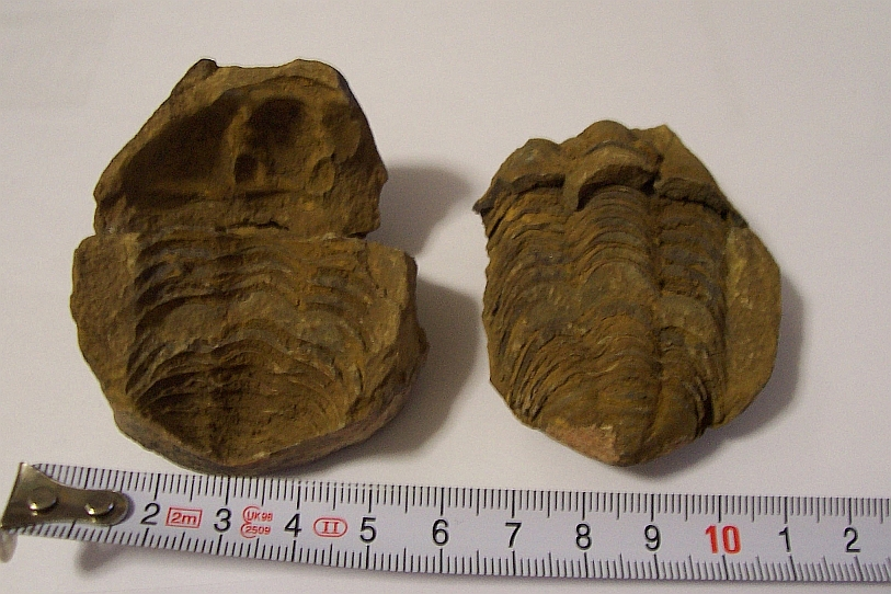 Fòssil de trilobit conegut com Diacalymene ouzregui o també Colpocoryphe (identificació facilitada per Sam Gon III). Motllo i contramotllo. L'exemplar prové de Casablanca, el Marroc. Imatge cedida per Ingrid C. Peiró